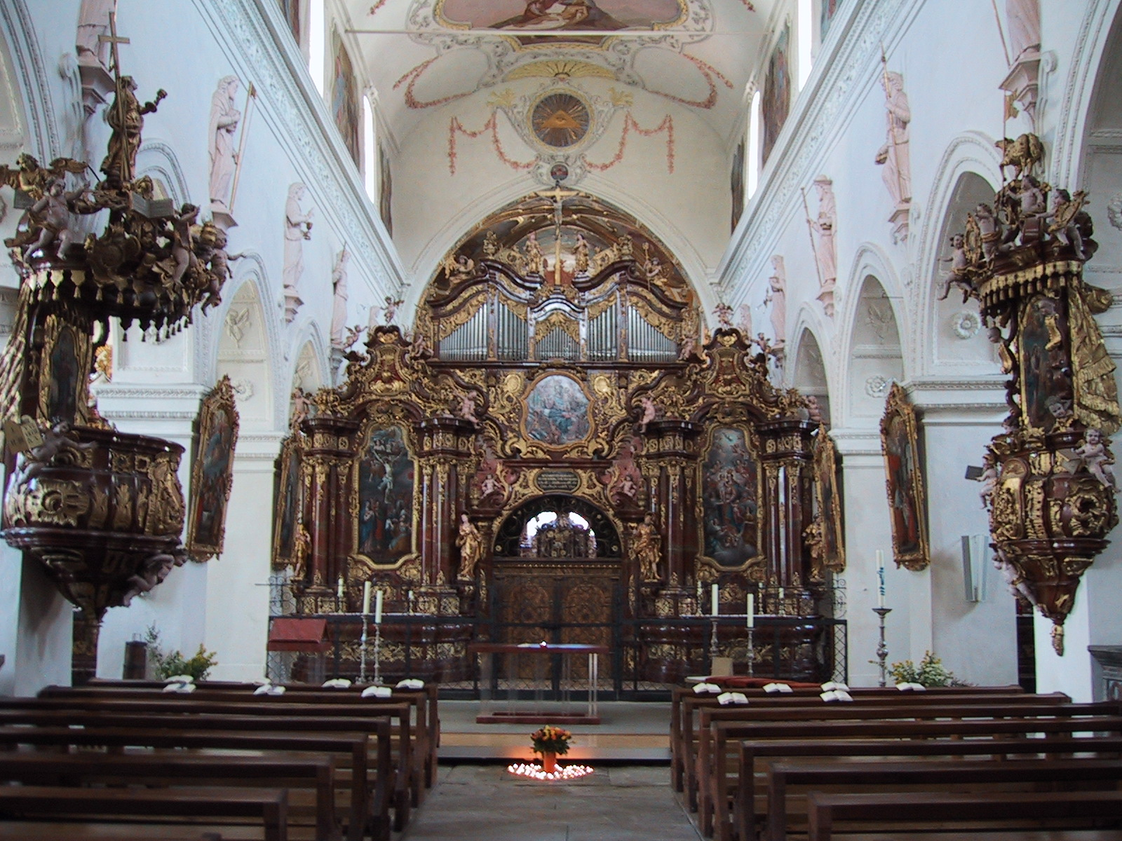 Inneres der Klosterkirche Wettingen, Langhaus.